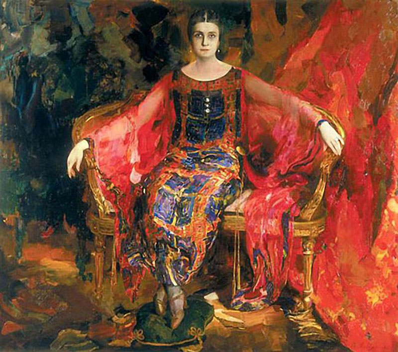 Портрет Александры Балашовой, 1924